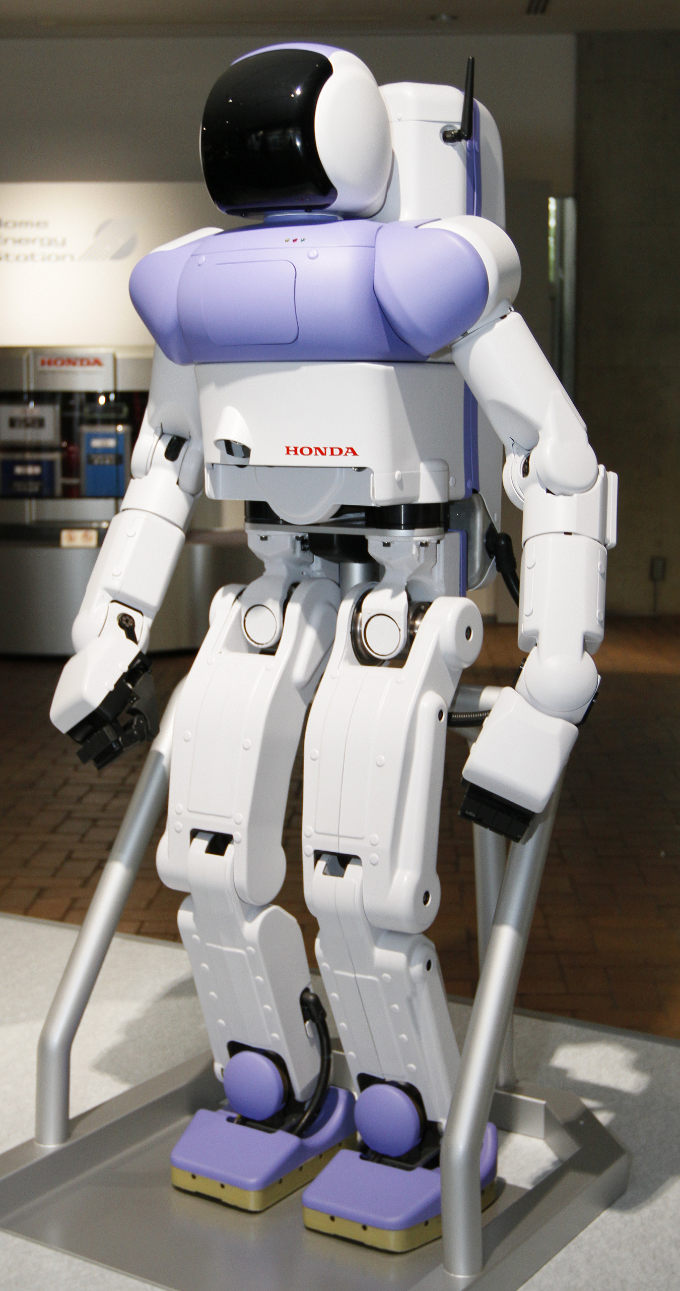 Honda P4